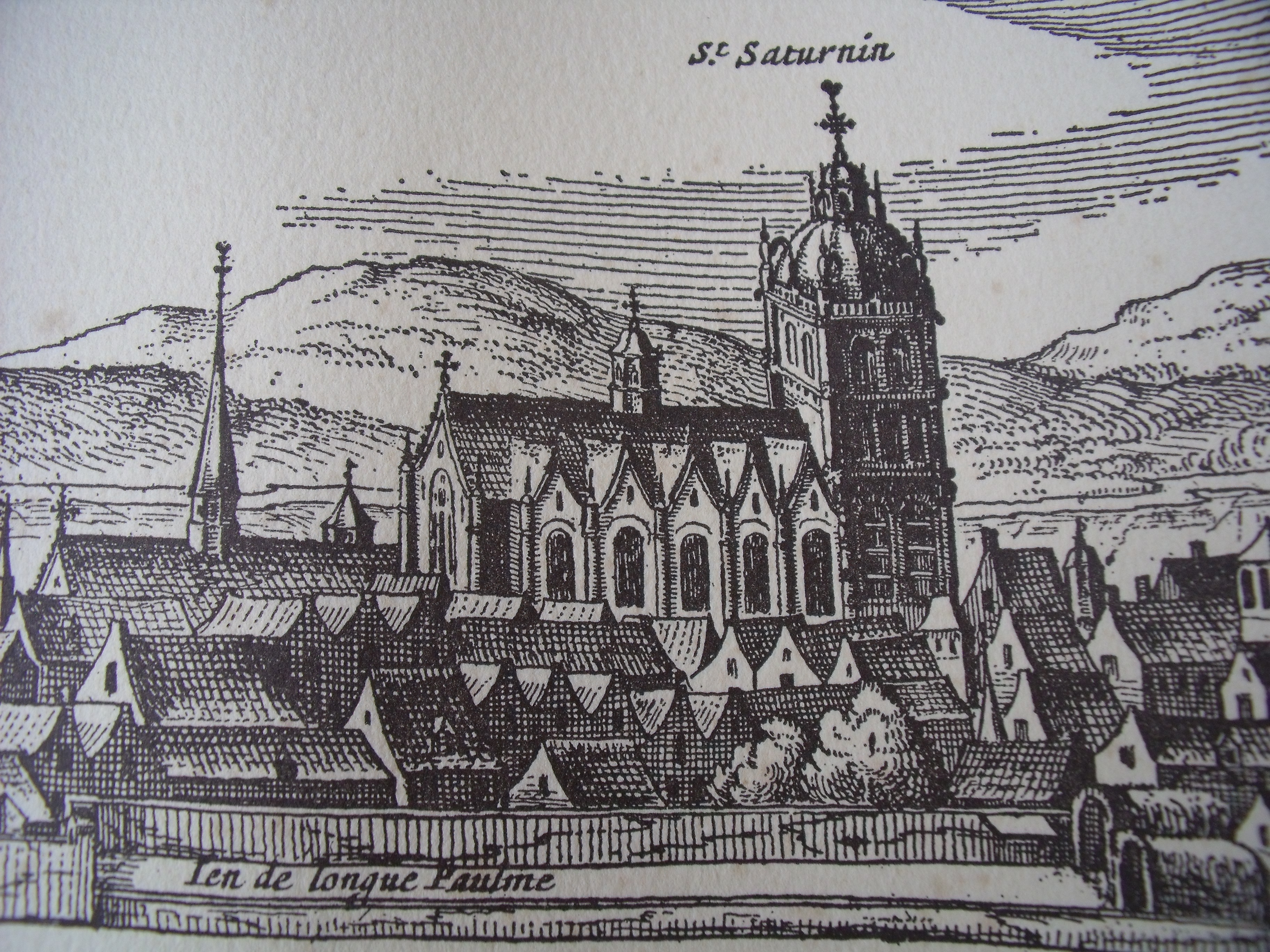 Rue du commerce, tours, église saint saturnin